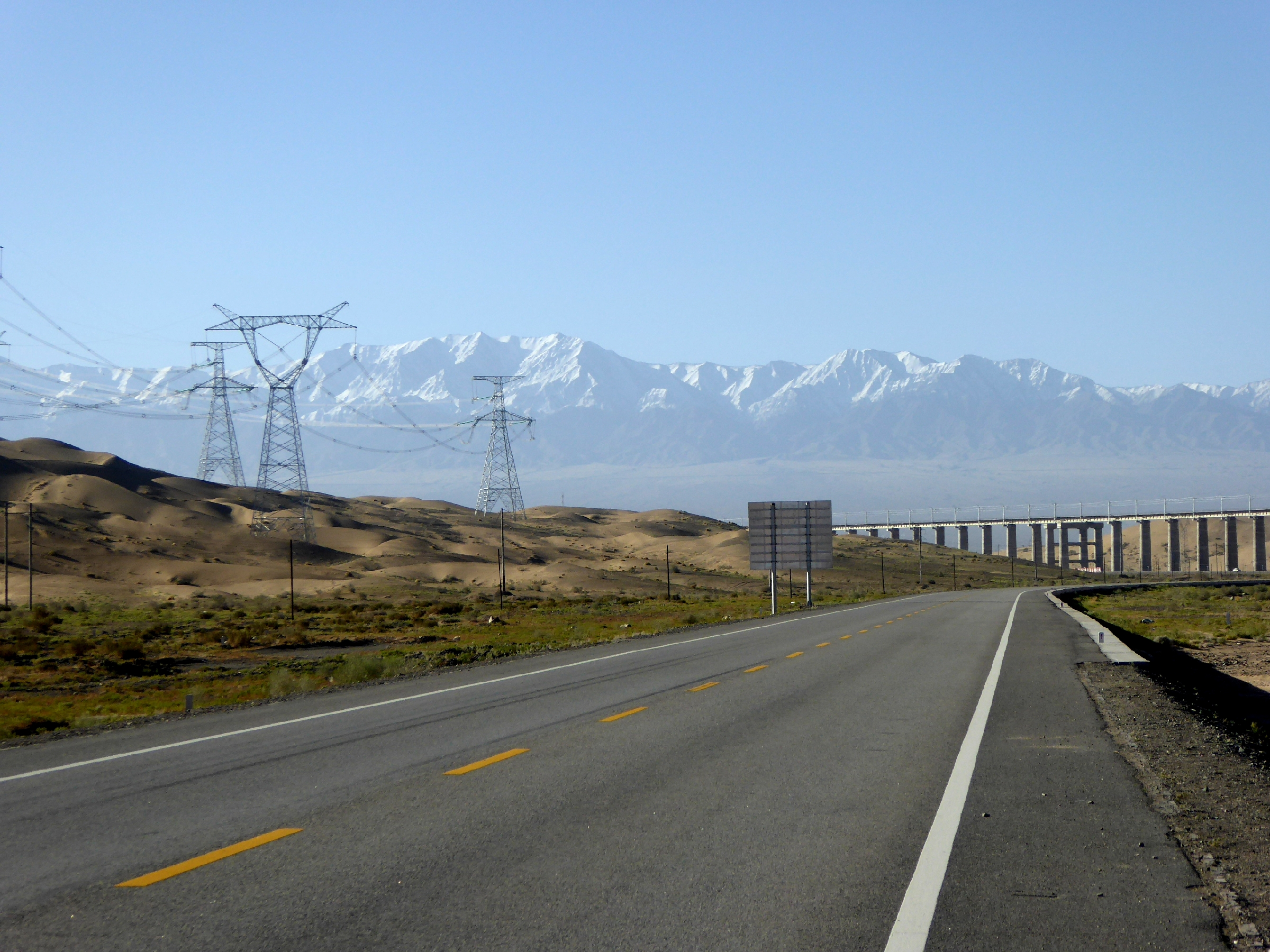 Altyn-Tagh Aksai Jiuquan Gansu China 甘粛省 阿克塞哈萨克族自治县 阿尔金山脉